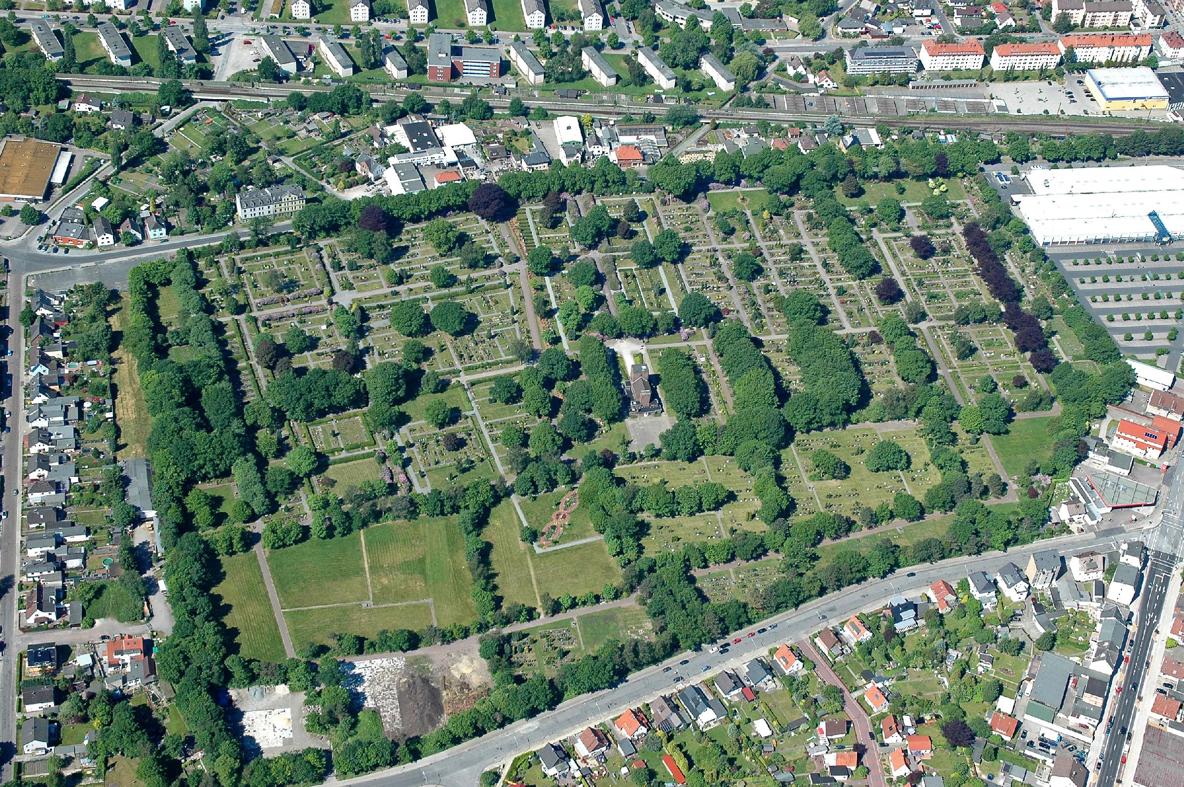 Friedhof Bremerhaven-Geestemünde Fotoflug vom Flugplatz Nordholz-Spieka über Cuxhaven und Wilhelmshaven